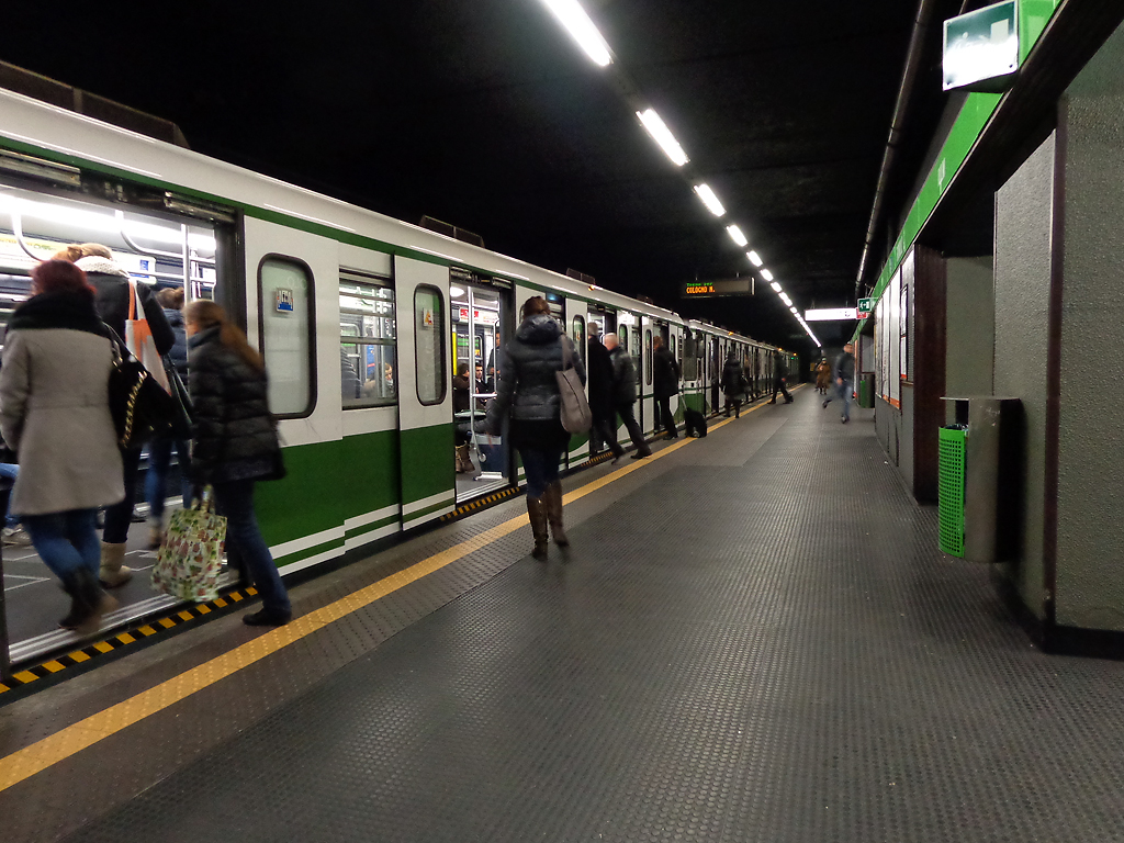 Stazione di Romolo della metropolitana di Milano